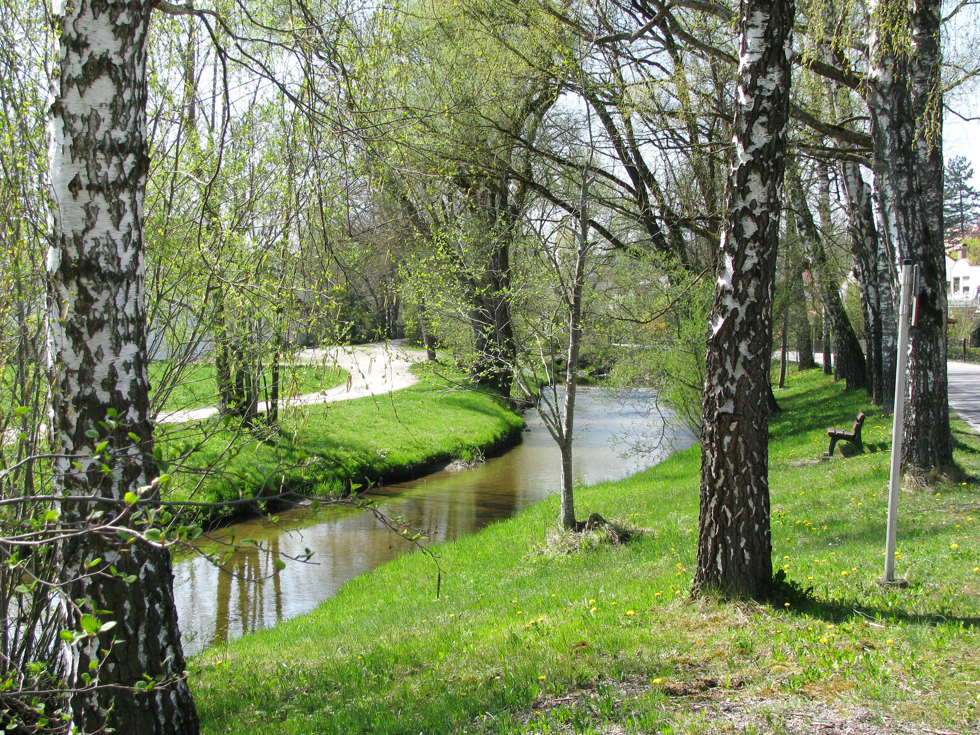 Die Windach in Windach ist Teil eines FFH-Gebietes